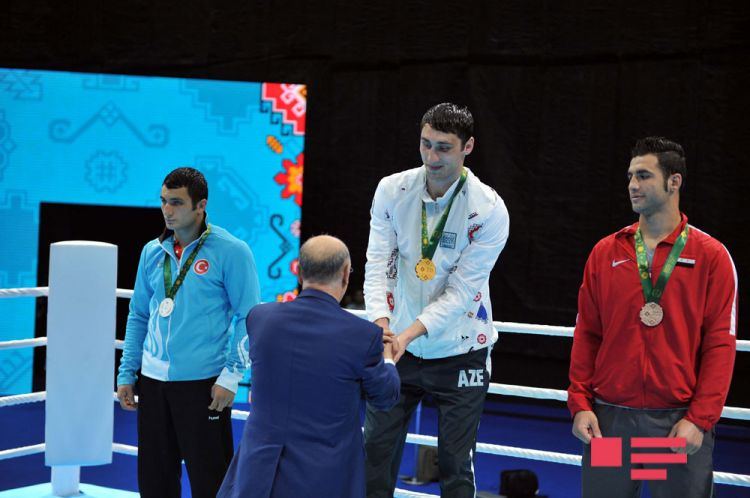 Teymur Məmmədov 2017 İslam Həmrəyliyi Oyunlarının mükafatlandırma mərasimində.